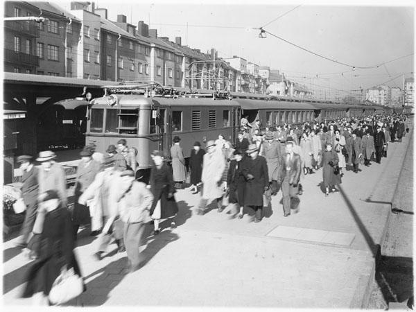 SRJ:s elektrolok nr. 54 med nyankommet tåg och trafikanter på Stockholms Östra.